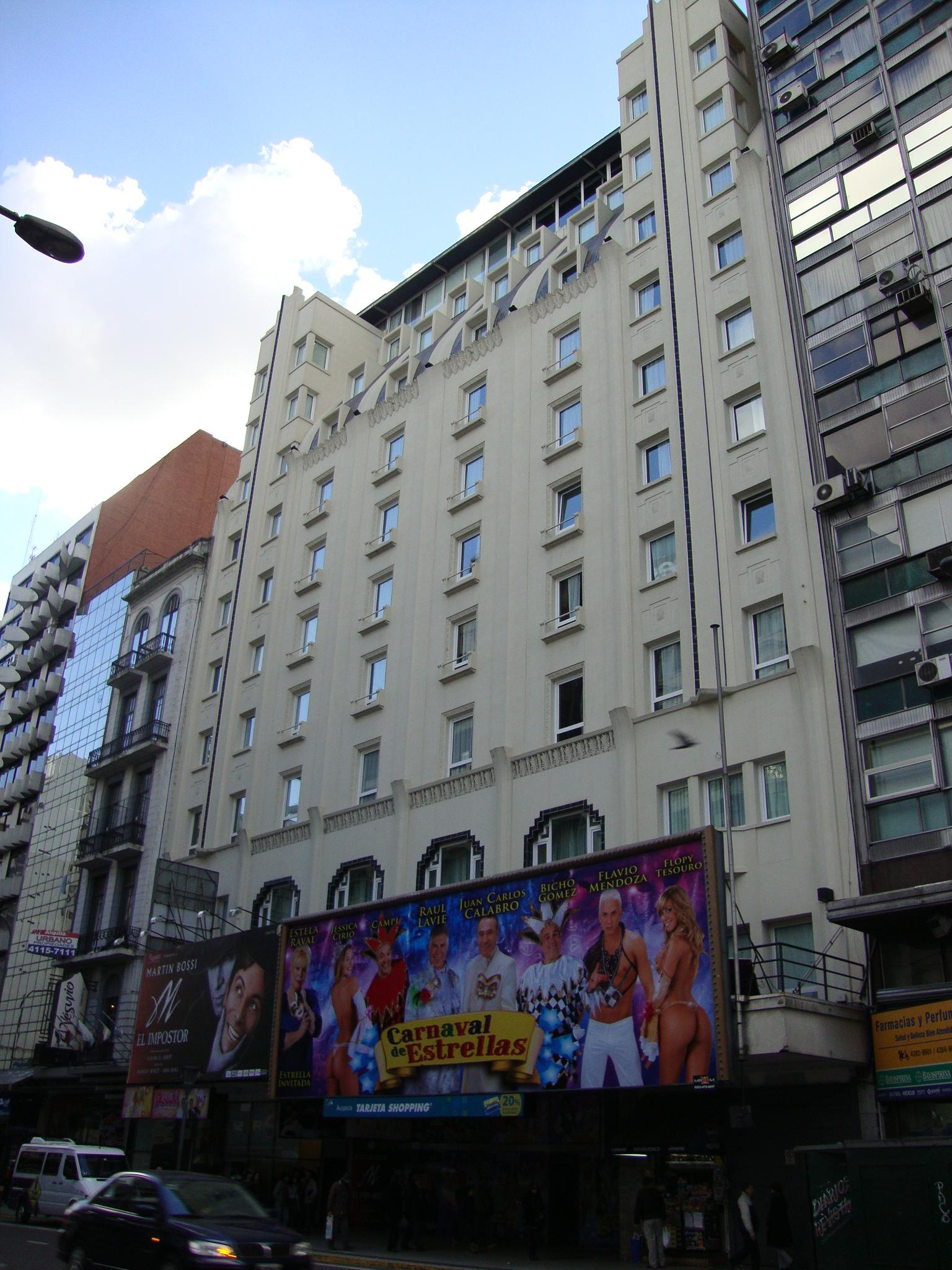 Teatro Broadway, en Avenida Corrientes. En sus pisos superiores funciona el Broadway Hotel & Suites. Buenos Aires, Argentina.